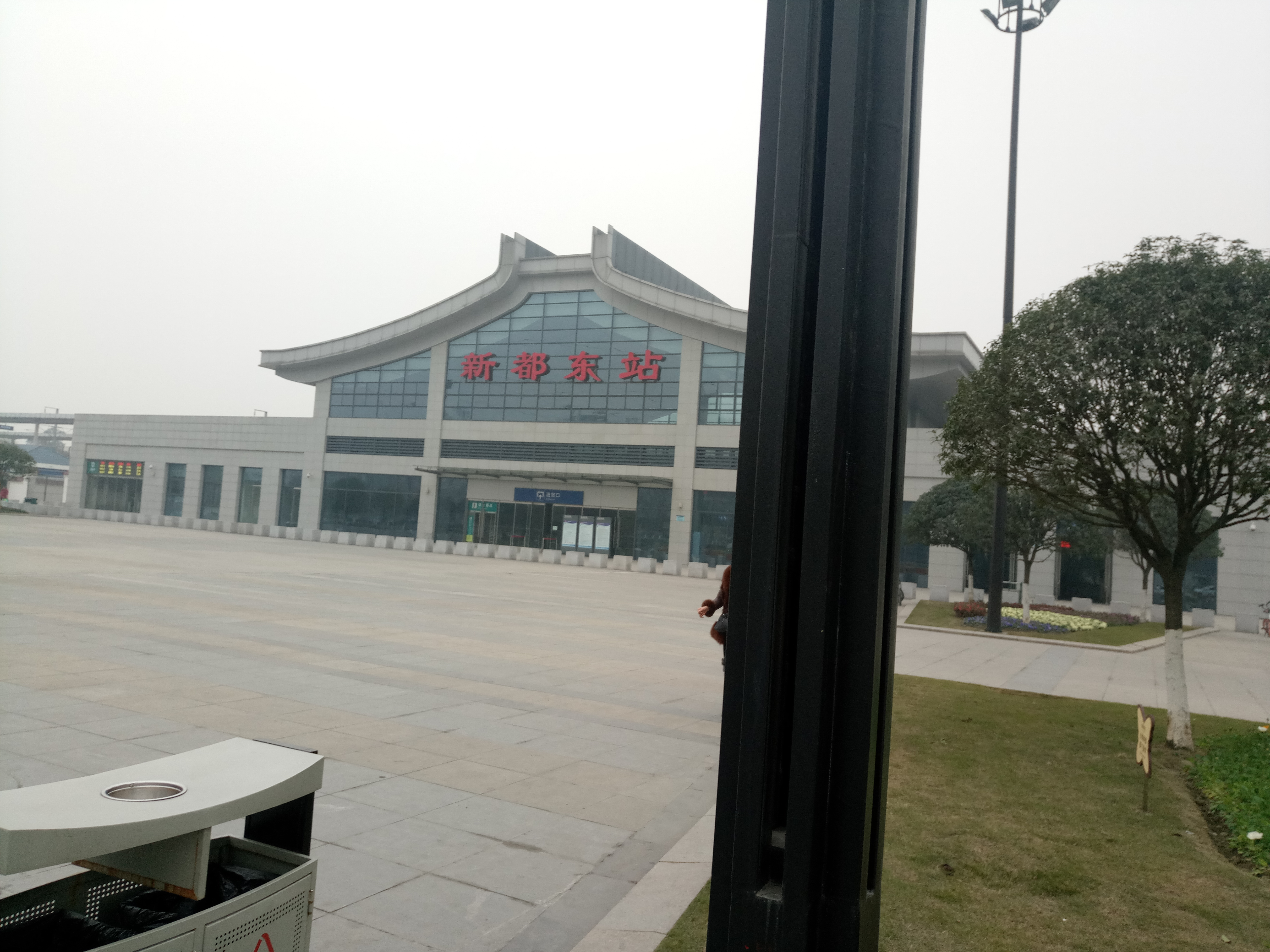 中文（中国大陆）: 新都火车东站正面像。